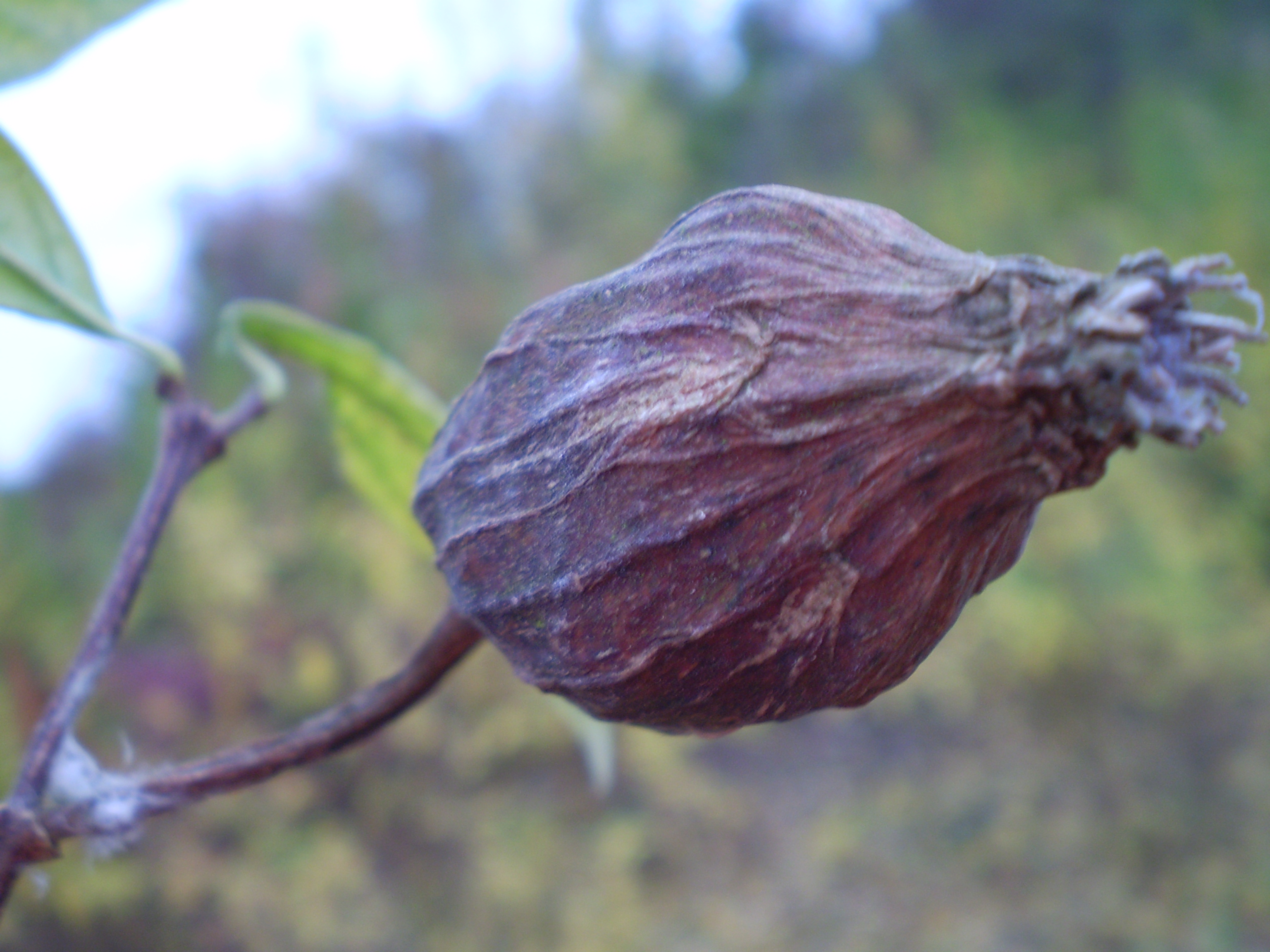 Calycanthus floridus — seed pod. meloenboompje/specerijstruikje